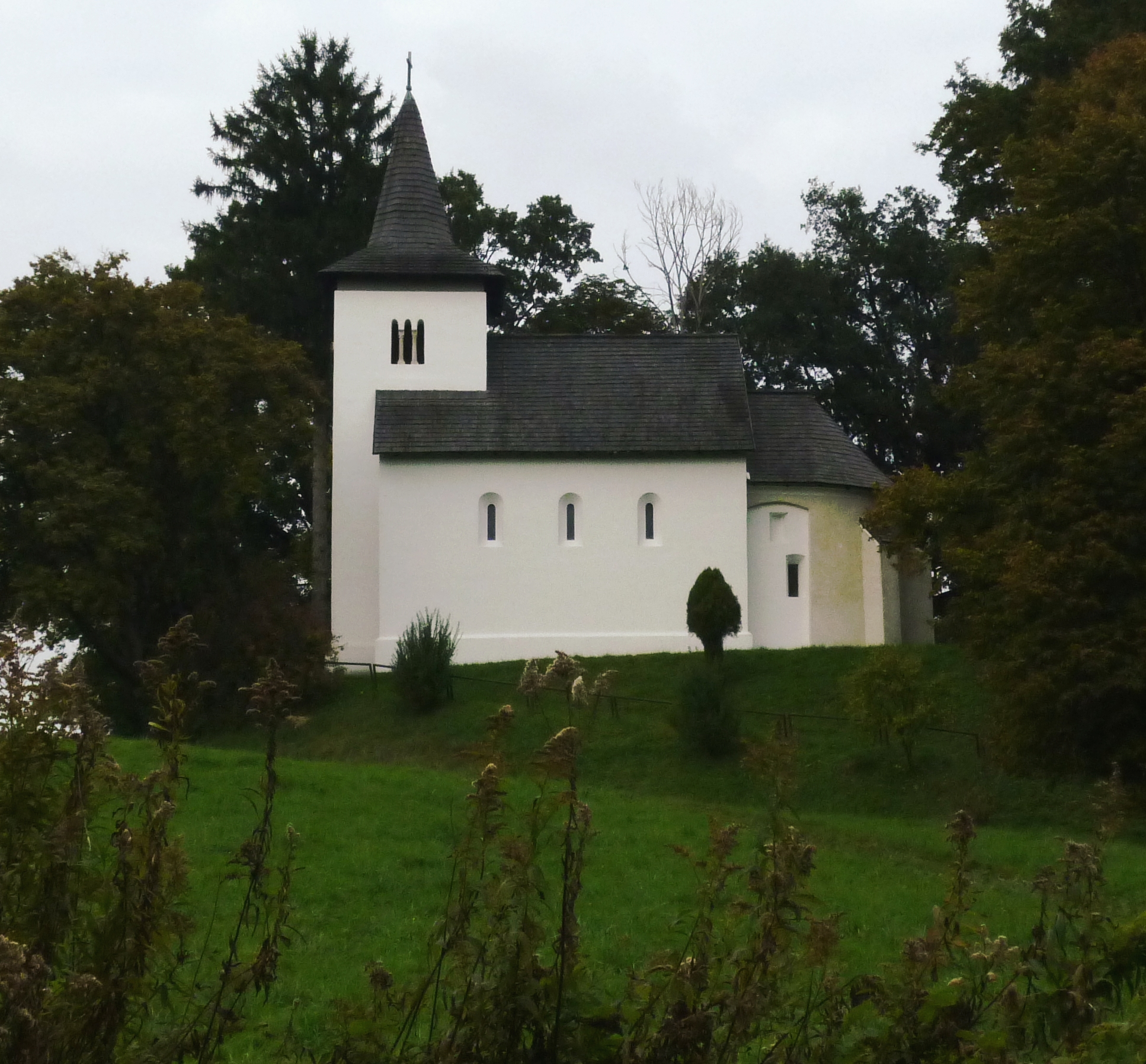 A római katolikus templom déli homlokzata (Böde-Zalaszentmihályfa)